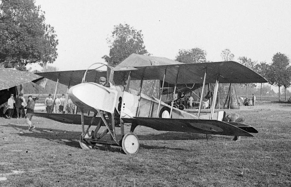 Vue d'ensmeble d'un avion biplan SPAD dans un champ d'aviation à Somme-Vesle dans la Marne. 1915. Guerre 1914-1918.